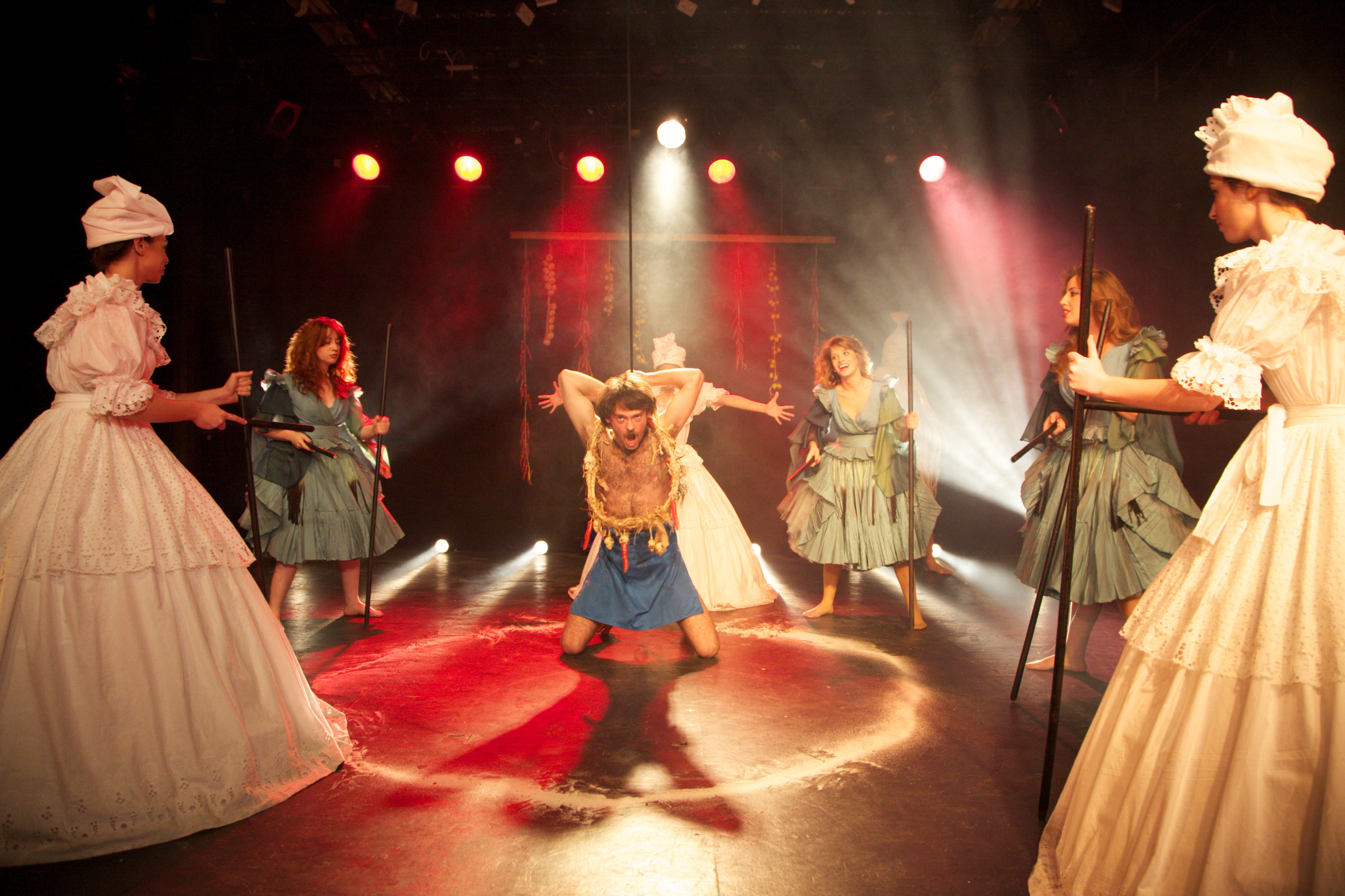 ההצגה דונה פלור נשואה לשניים בבימויו של עירד רובינשטיין בסל"ה - הסטודיו לאמנויות התיאטרון מיסודו של יורם לוינשטיין, 2012